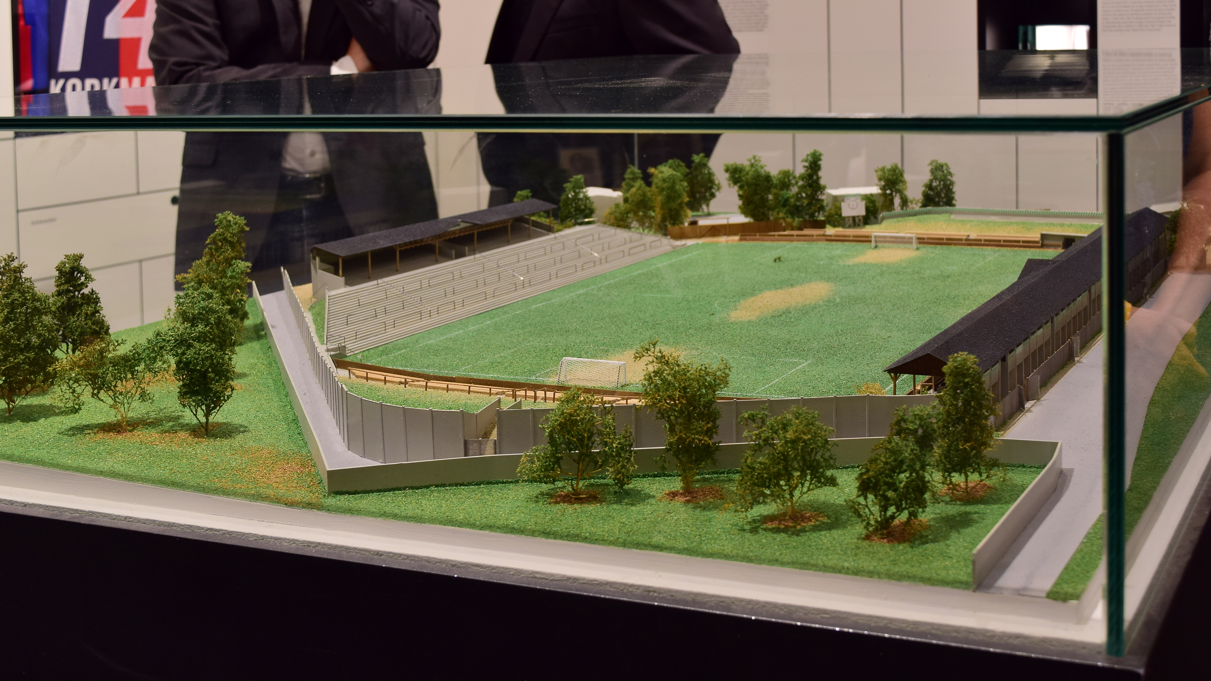 Modell des einstigen Rapid-Platzes auf der Pfarrwiese im neuen Rapideum im Allianzstadion